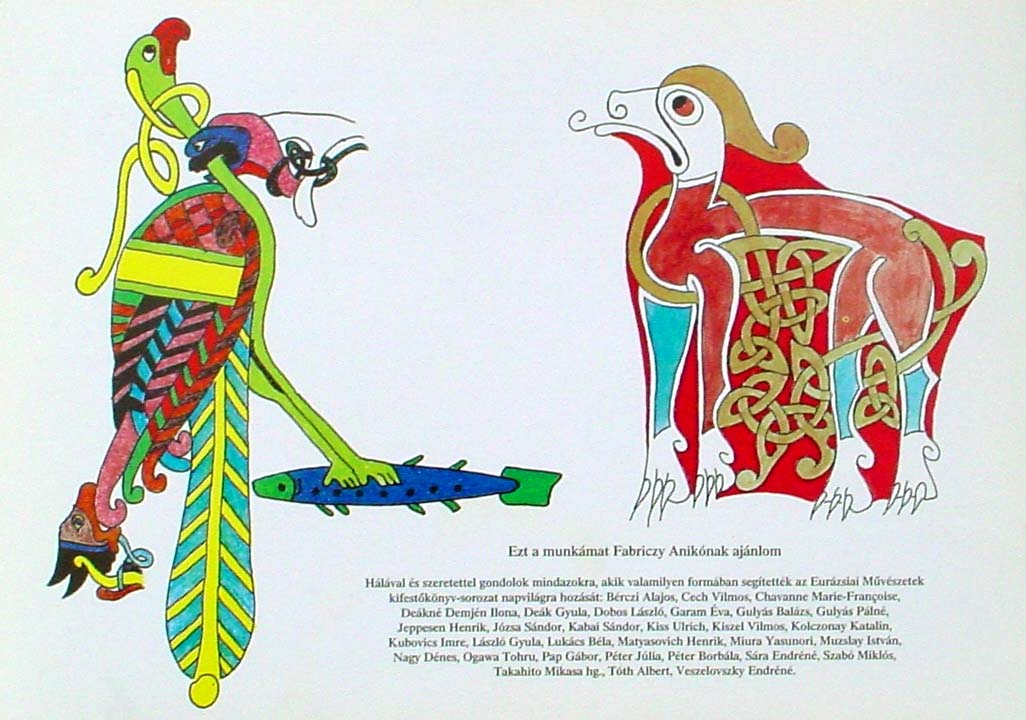 Állatalakos részletek rajza a Book of Kells-ből